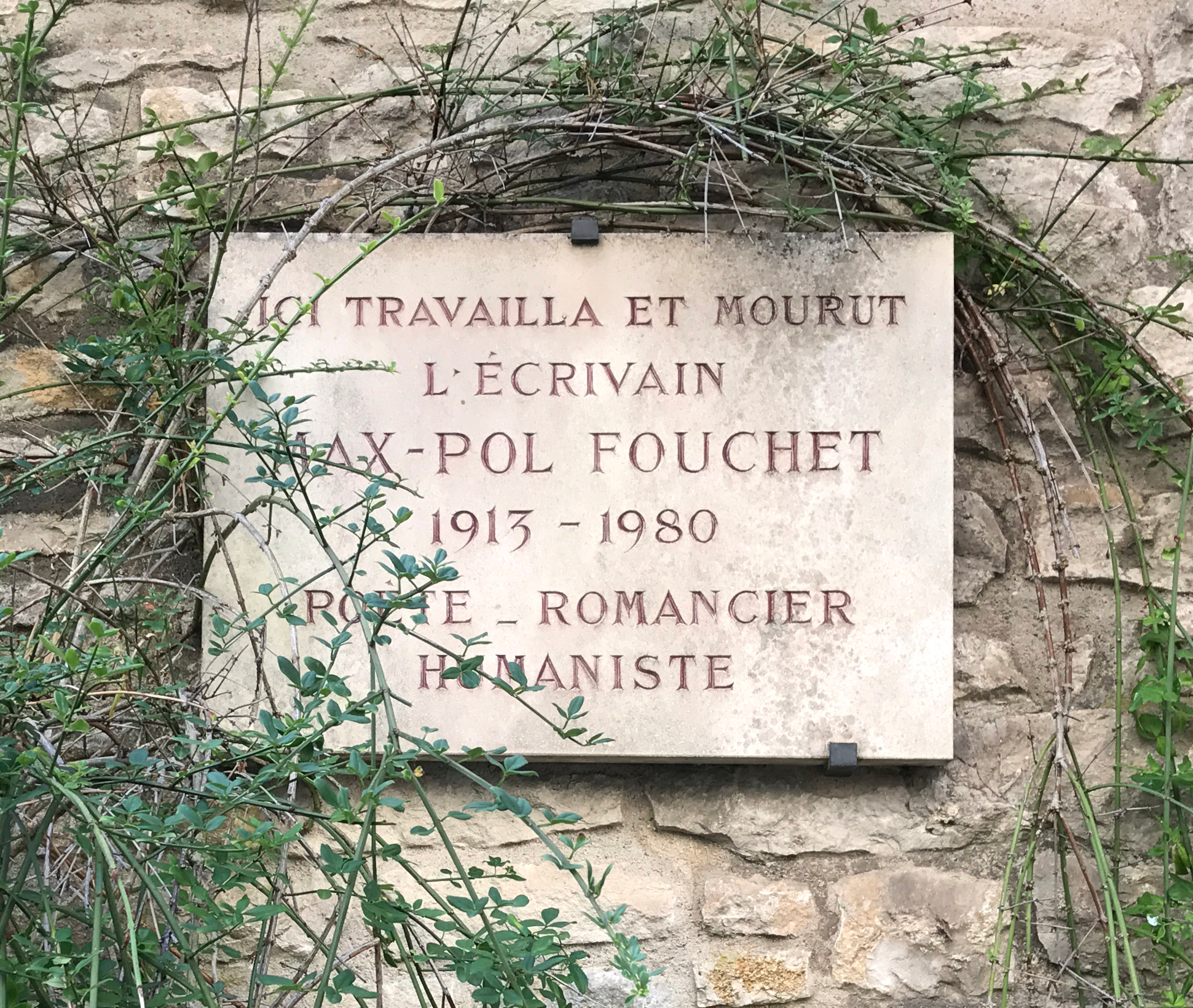 Image de Vézelay en août 2017.